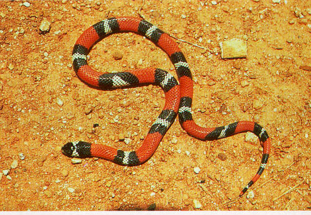 Erythrolamprus aesculapii, vulgarmente conhecida como a falsa coral, boicora ou falsa coral, é uma cobra colorida endêmica na América do Sul.